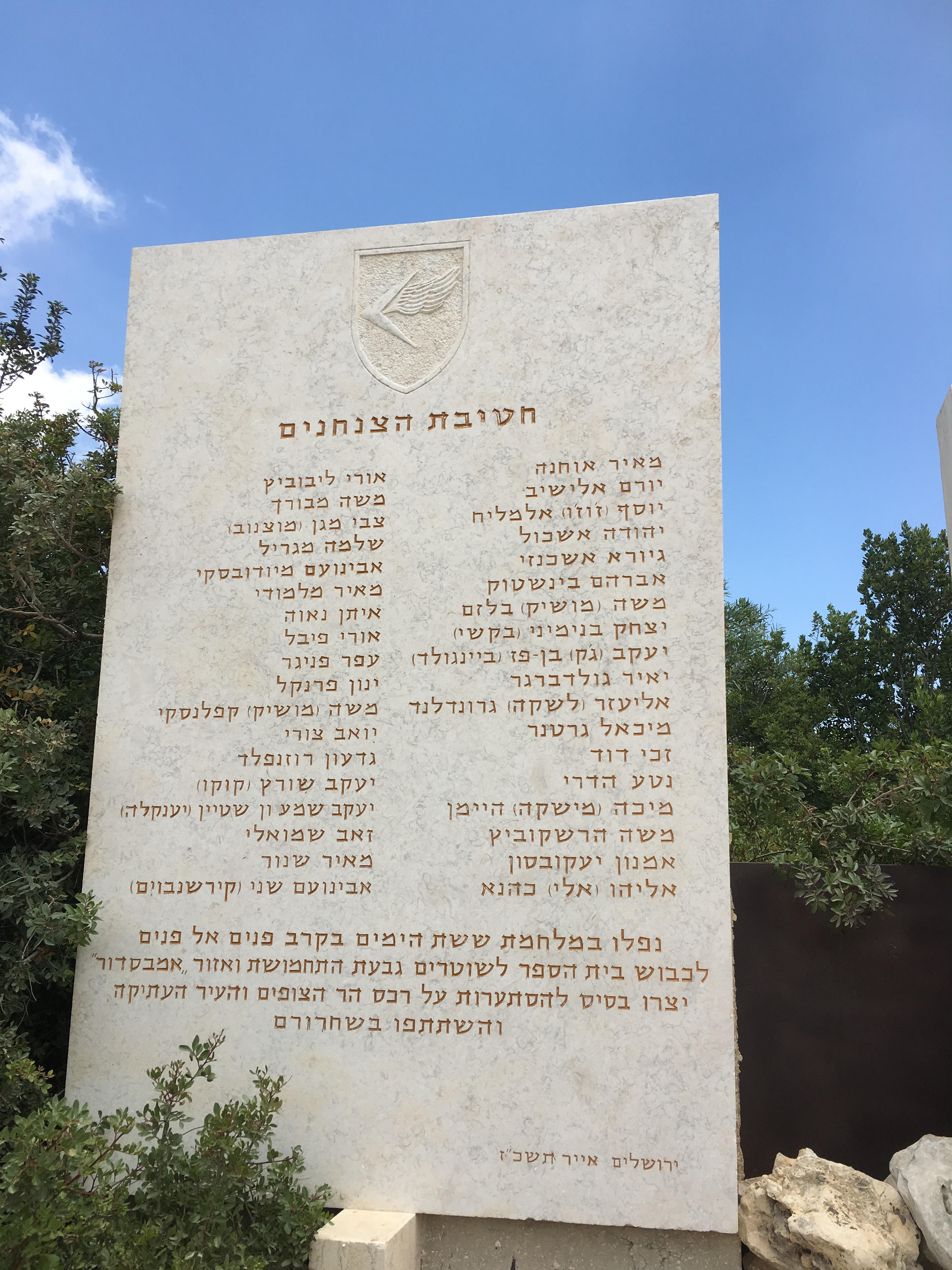 האנדרטה לחללי חטיבת הצנחנים שנפלו בגבעת התחמושת. החייל אורי לבוביץ שקיבל את עיטור המופת מופיע ראשון למעלה בשורה השמאלית